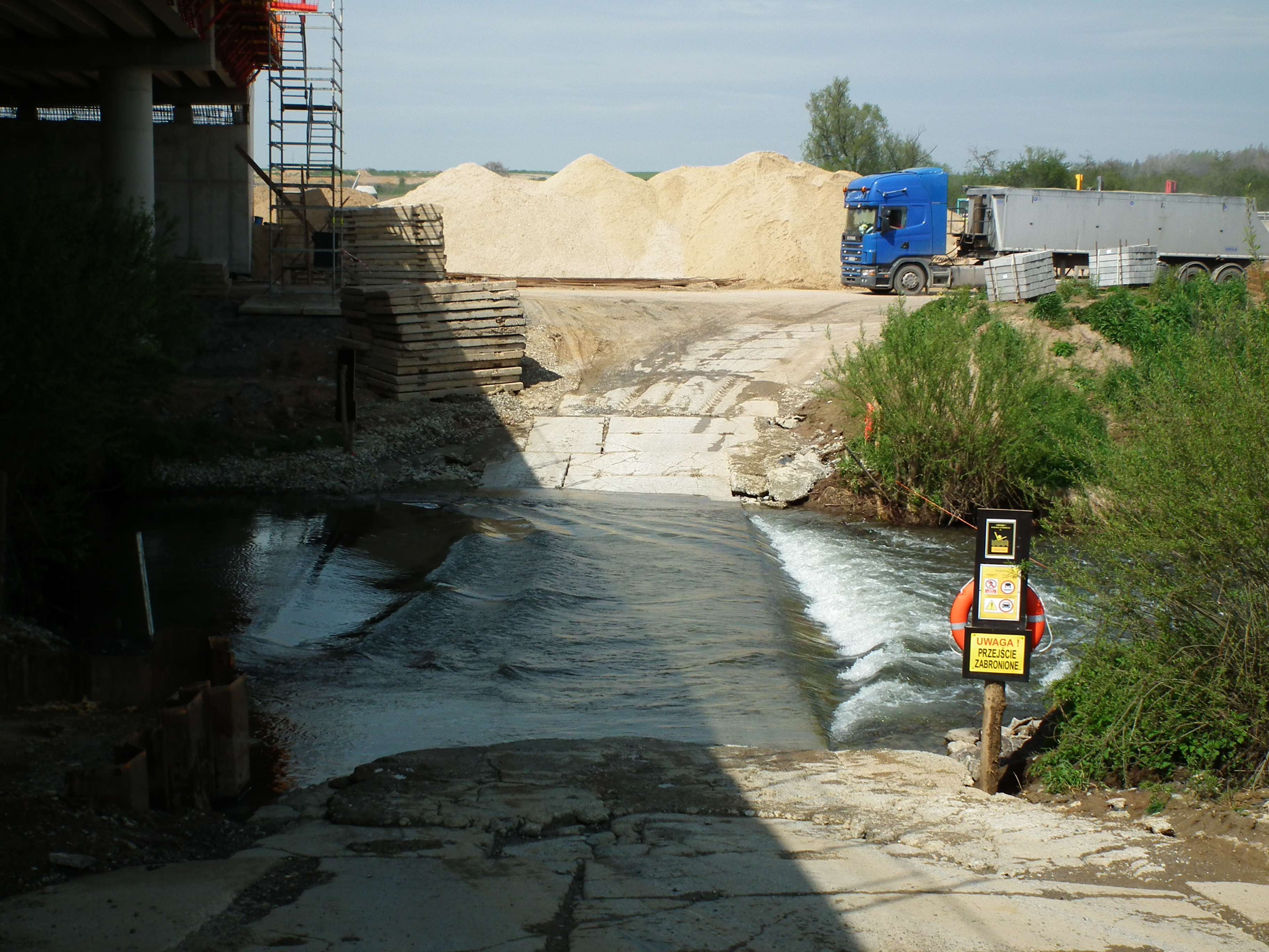 Budowa drogi S3 - most nad Nysą Szaloną w pobliżu Szymanowic.